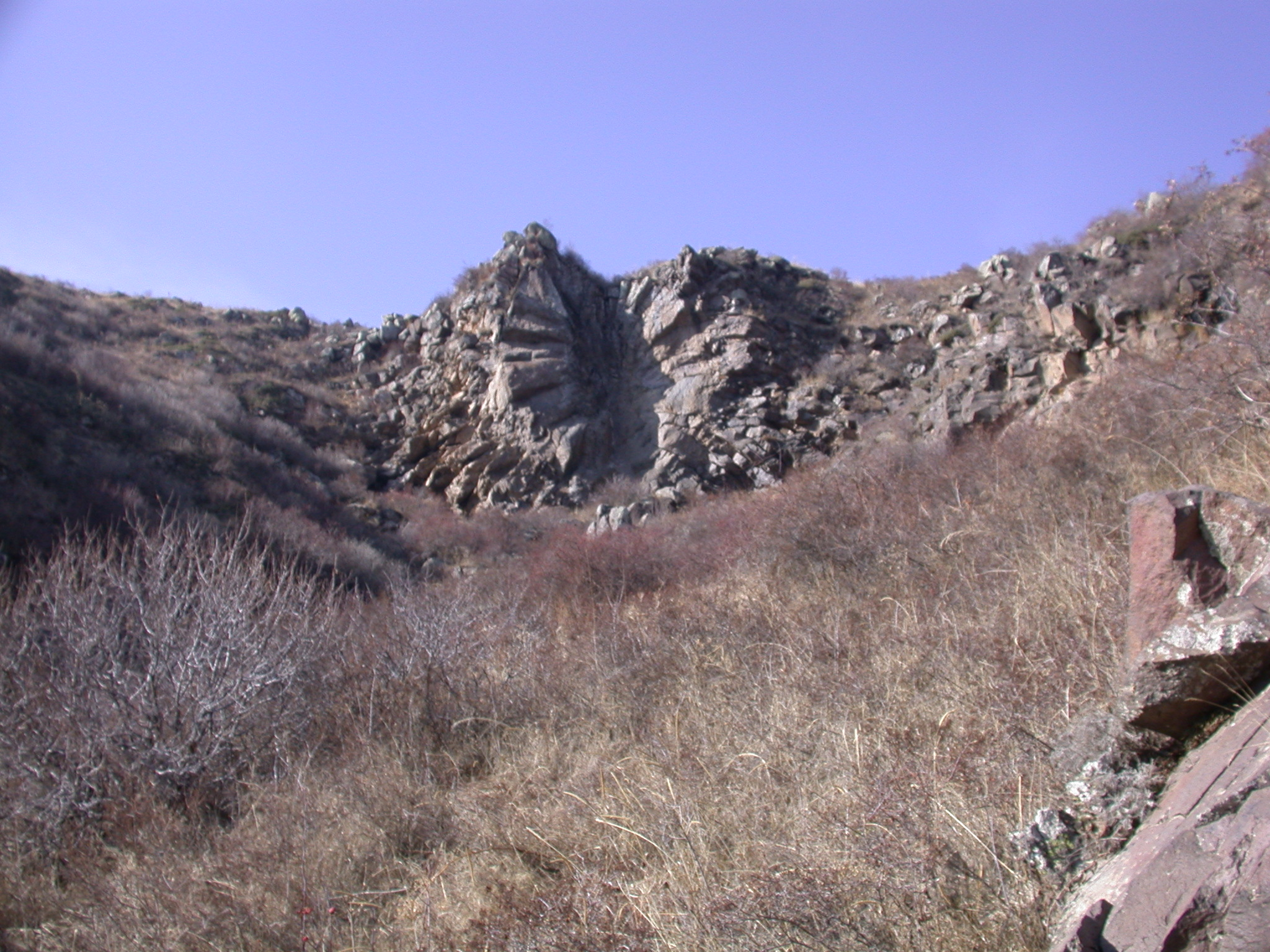 «Բազալտե արև», եզակի ճառագայթաձև անջատում